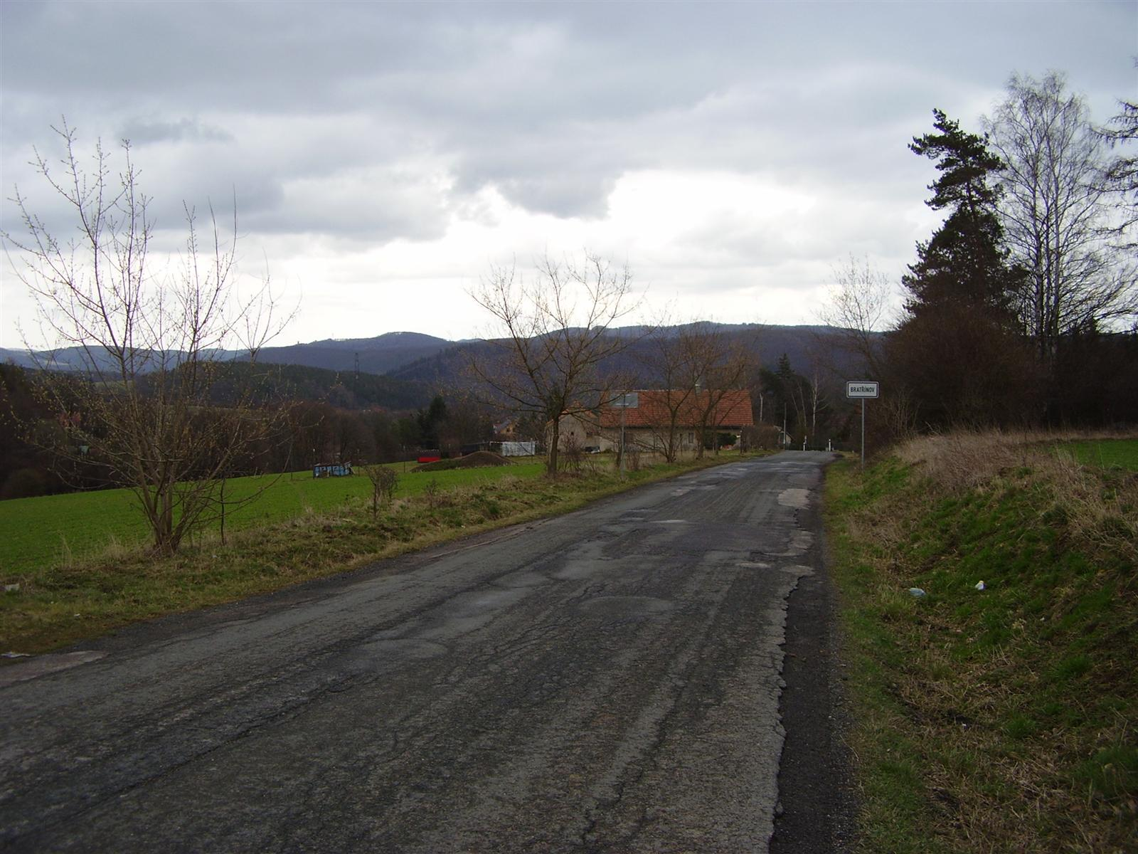 Konec Bratřínova ve středních Čechách na silnici směrem k Čisovicím